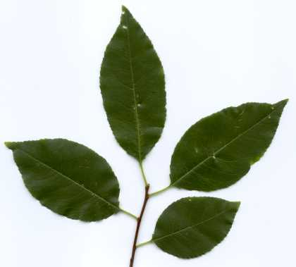 Prunus serotina